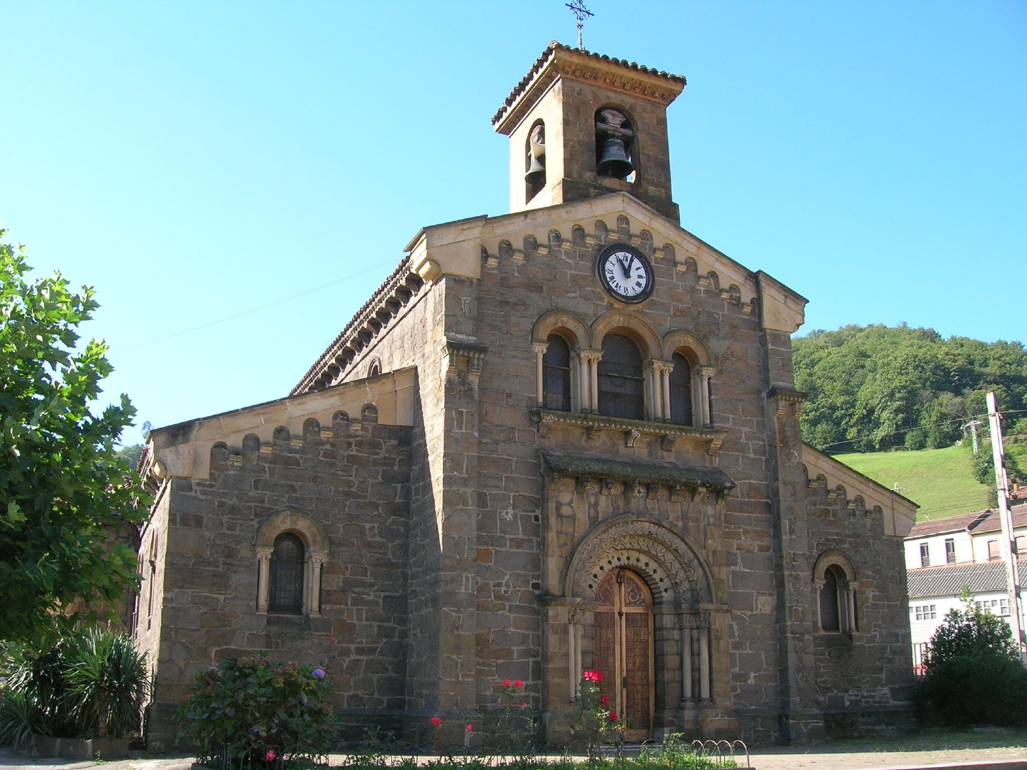 Iglesias de Santa Eulalia de Ujo